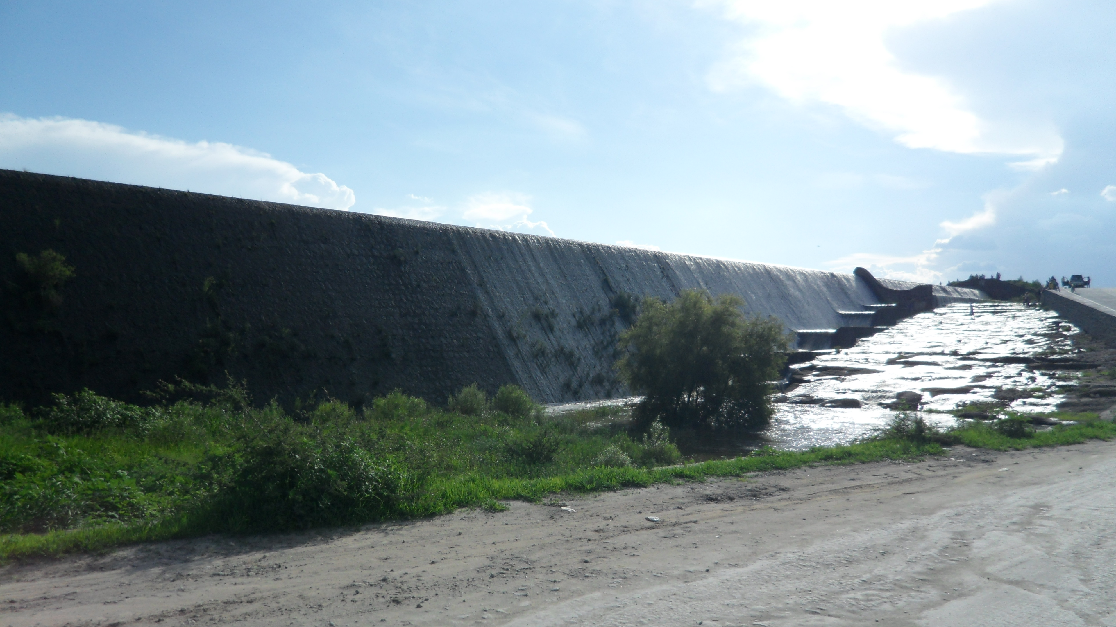 Presa San Mieguel en San Miguel el Alto, Jalisco.